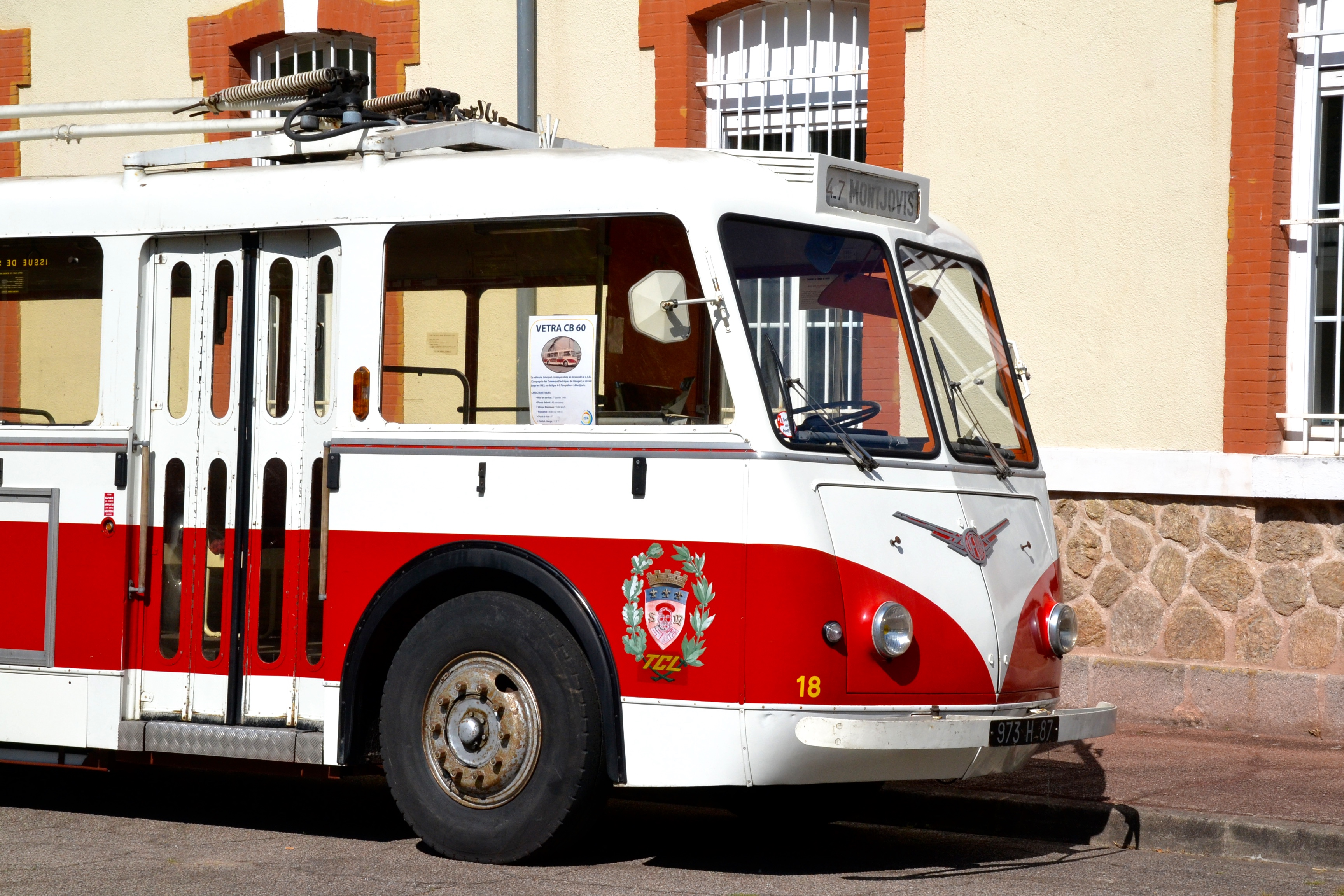 Un ancien trolleybus Vetra CB60 de Limoges, exposé en 2015 lors du Forum des associations de la ville.